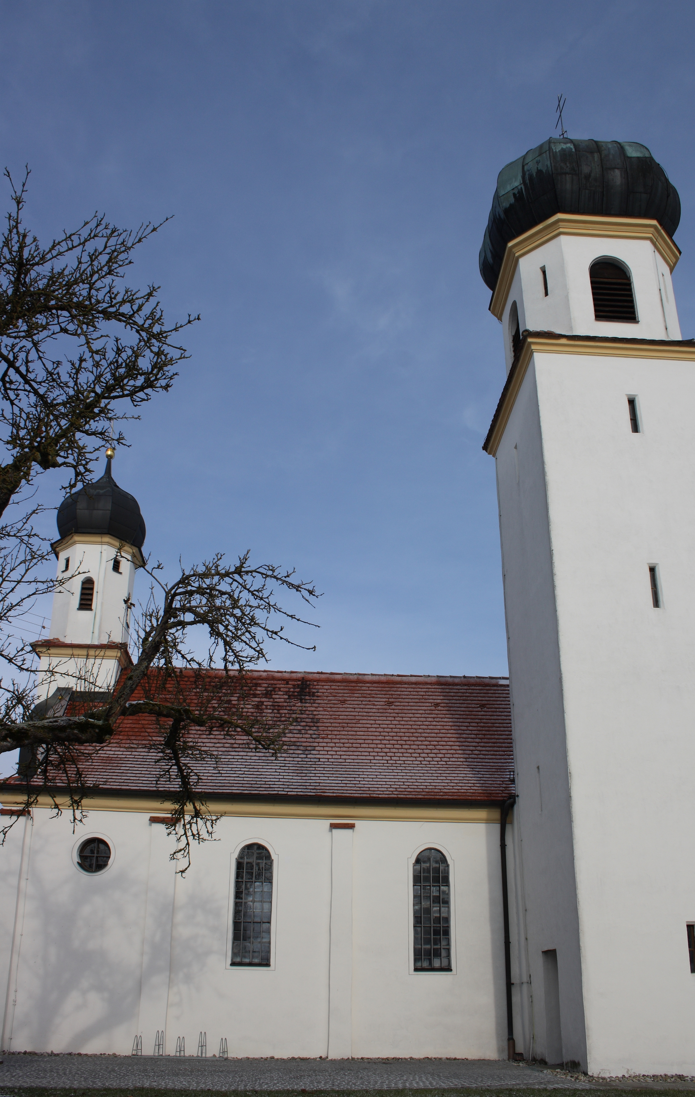 Katholische Filialkirche St. Leonhard in Baumgarten, einem Ortsteil von Aislingen im Landkreis Dillingen an der Donau (Bayern)